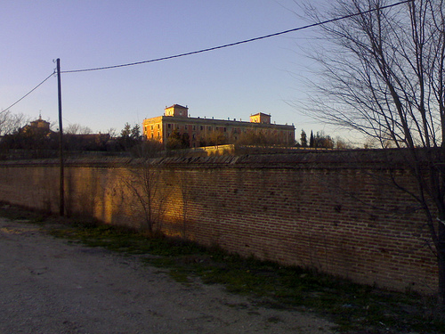 Palacio del Infante don Luis, Boadilla del Monte, Community of Madrid, Spain